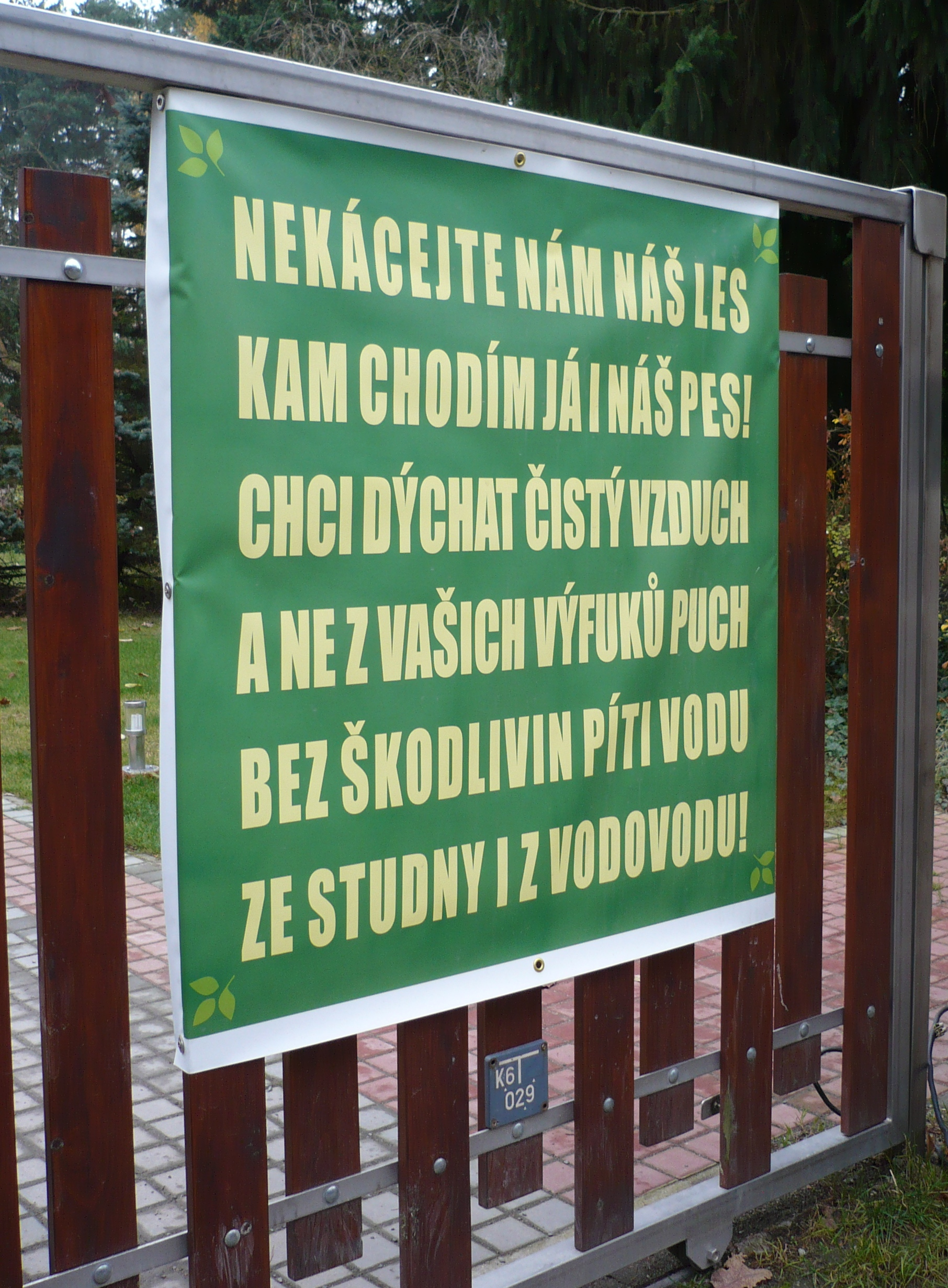 Protest jednoho z obyvatel Klánovic proti zamýšlenému kácení stromů na pozemcích státní firmy Lesy České republiky, na kterých chce společnost Forest Golf Resort Praha vybudovat golfové hřiště